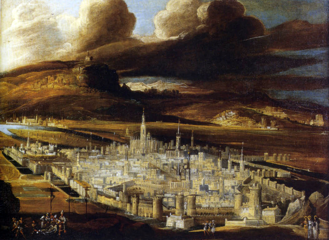 Vue de Metz depuis la colline Bellecroixlabel QS:Lfr,"Vue de Metz depuis la colline Bellecroix" Anciennement ("vue de Jérusalem")